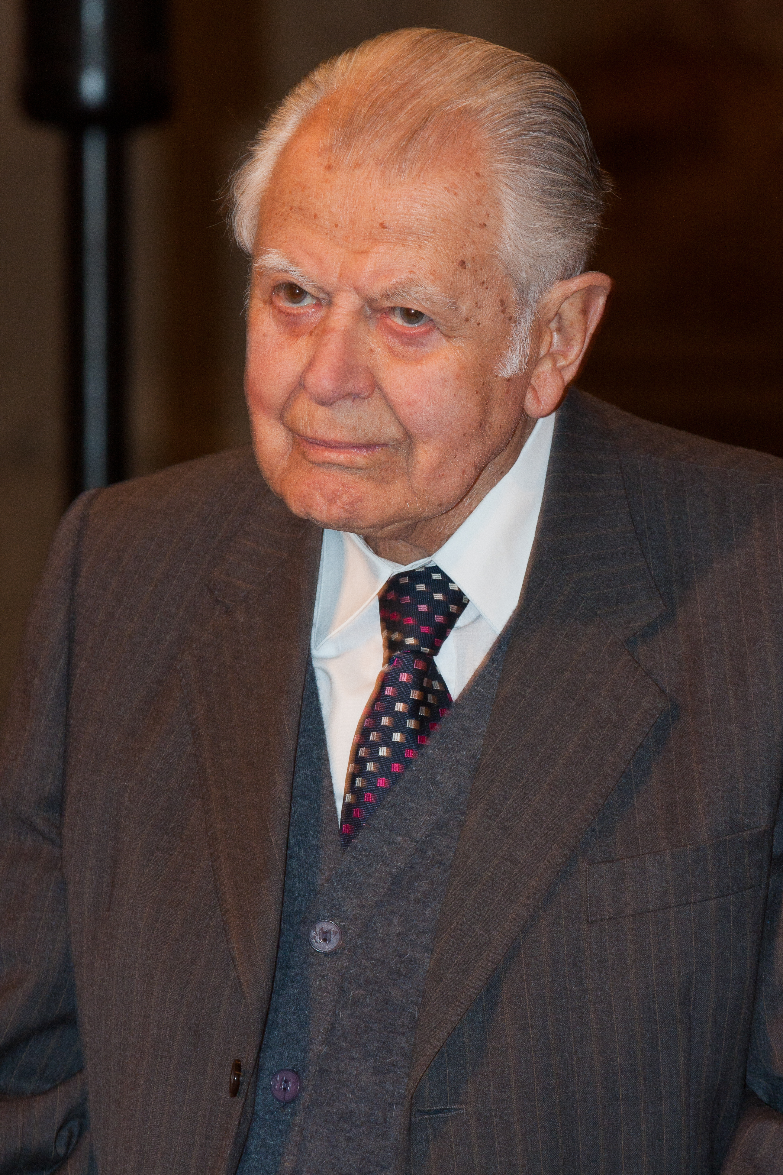 Patricio Aylwin Azócar (n. Viña del Mar, 26 de noviembre de 1918) es un político democratacristiano y jurista chileno. Fue presidente del Senado de 1971 a 1972 y primer mandatario de su país durante el periodo comprendido entre 1990 y 1994. Aylwin fue el primer presidente democráticamente electo tras el golpe de Estado del 11 de septiembre de 1973, en el que fue derrocado Salvador Allende y se instauró la dictadura de Augusto Pinochet. Así, el mandato de Aylwin dio inicio al periodo conocido como la Transición y el primero de los cuatro gobiernos consecutivos de la Concertación de Partidos por la Democracia.